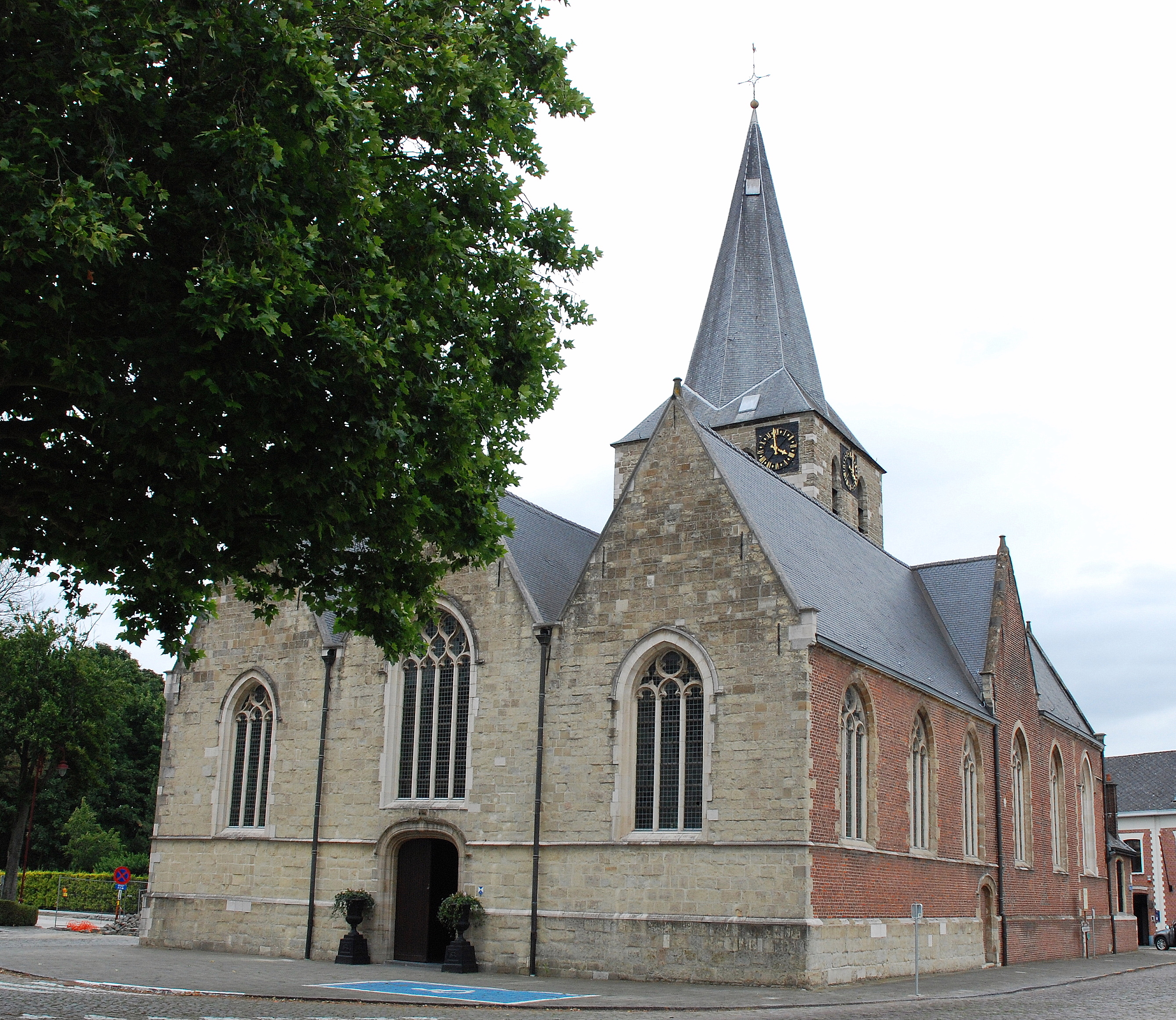 Sint-Machariuskerk te Laarne, België